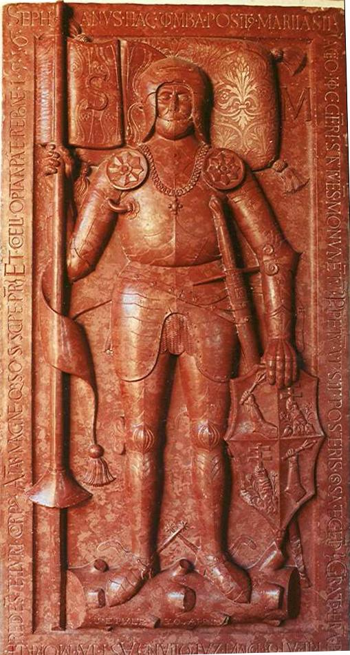 Gisant de István Máriássy (1463–1516), Markušovce (Márkusfalava en hongrois), Slovaquie, 1516